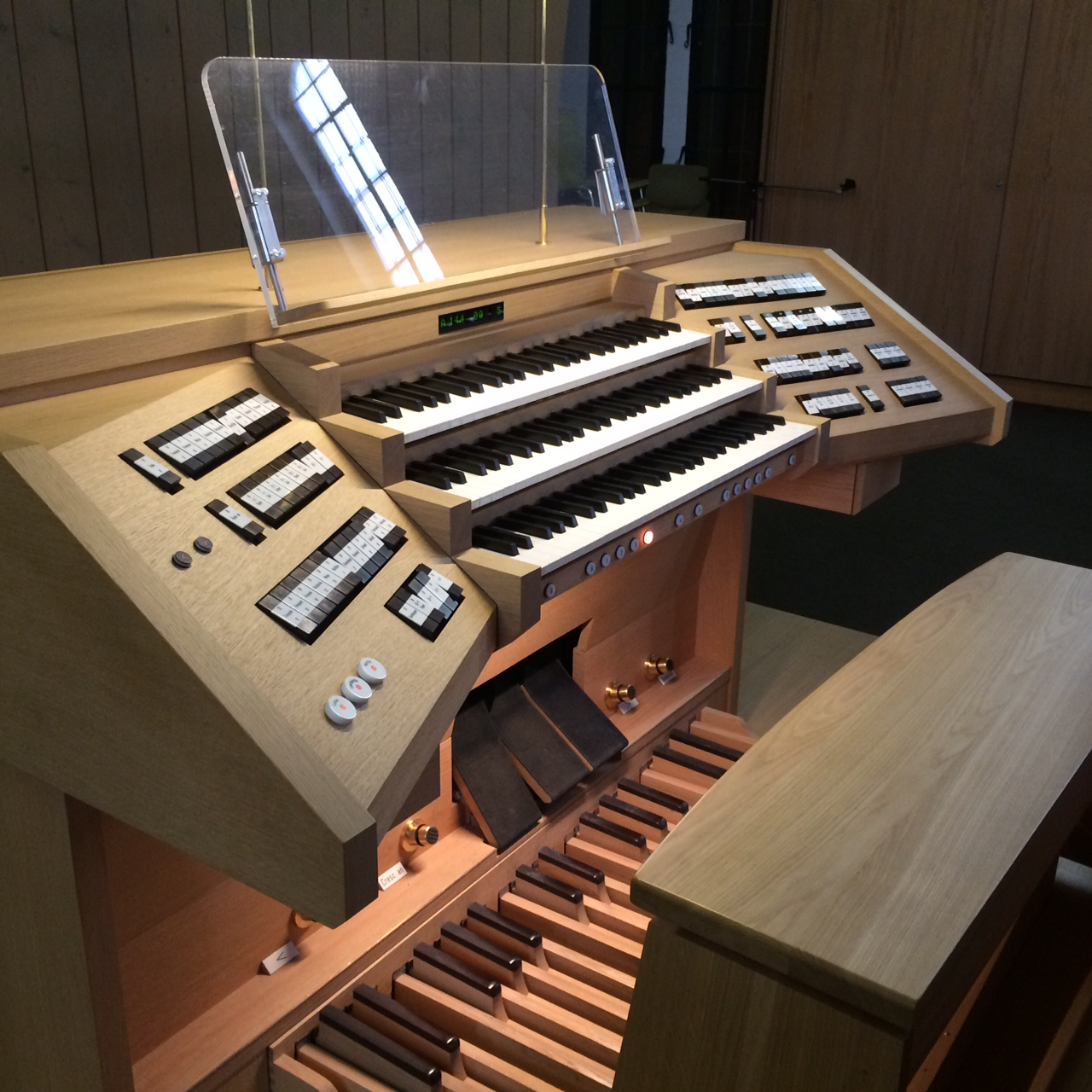 Spieltisch St. Thaddäus Augsburg (2014)